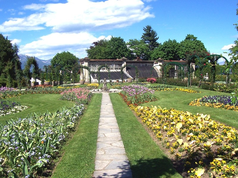 Stresa - Parco di Villa Pallavicino